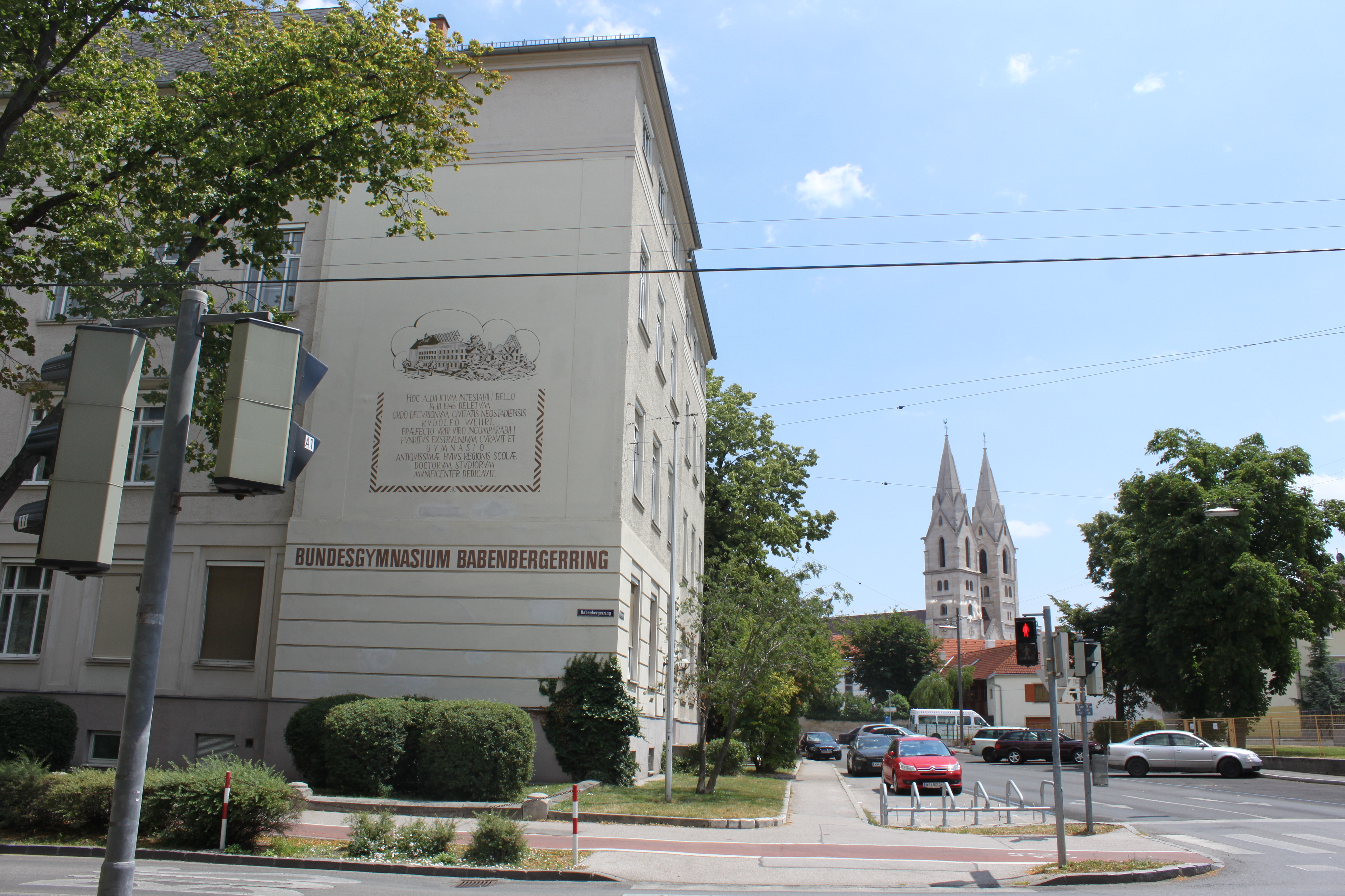 Bundesgymnasium Babenbergerring, Hauptgebäude, 1910, im Hintergrund die Türme des Domes